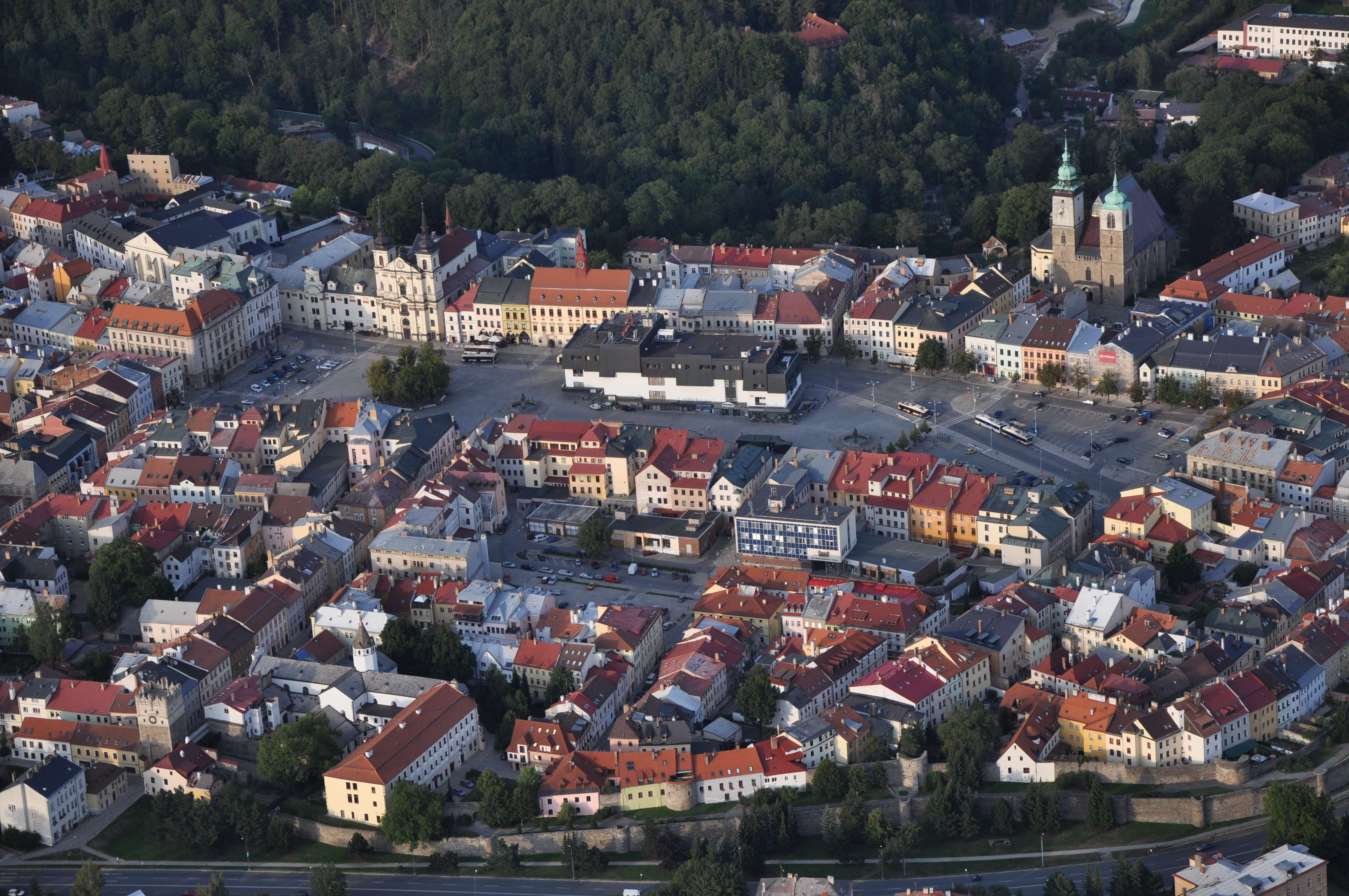 Letecký pohled na Masarykovo náměstí.